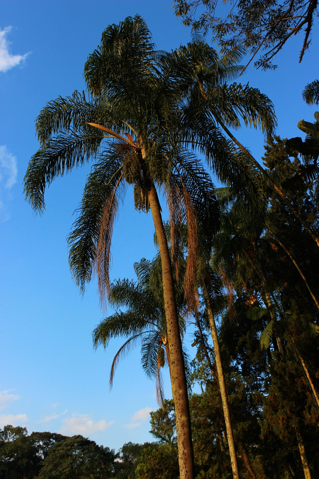 Insira_uma_descrição_para_sua_foto